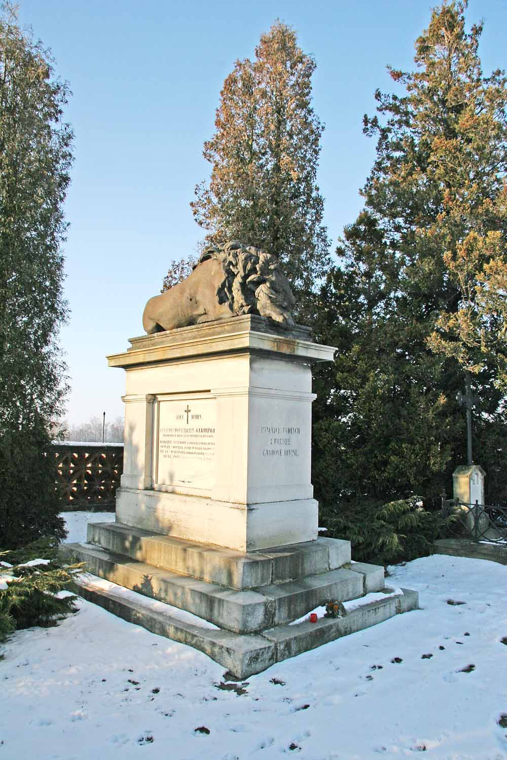 Pomník z Prusko-rakouské války roku 1866